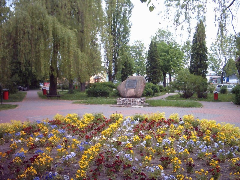 Kamień upamiętniający obrońcę Hajnówki z IX.1939 r. kpr. B. Bierwiaczonka.